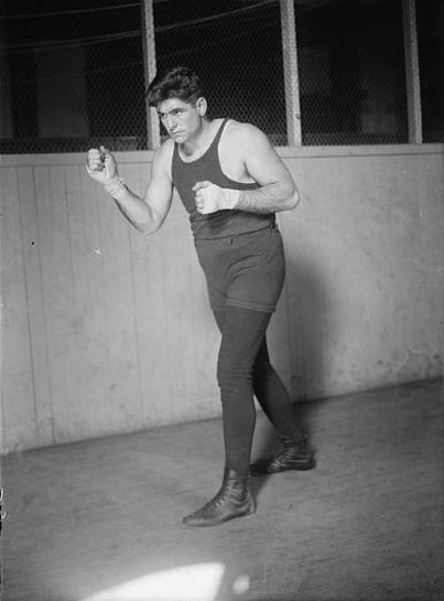 Luis Ángel Firpo (1894-1960), Argentinian boxer